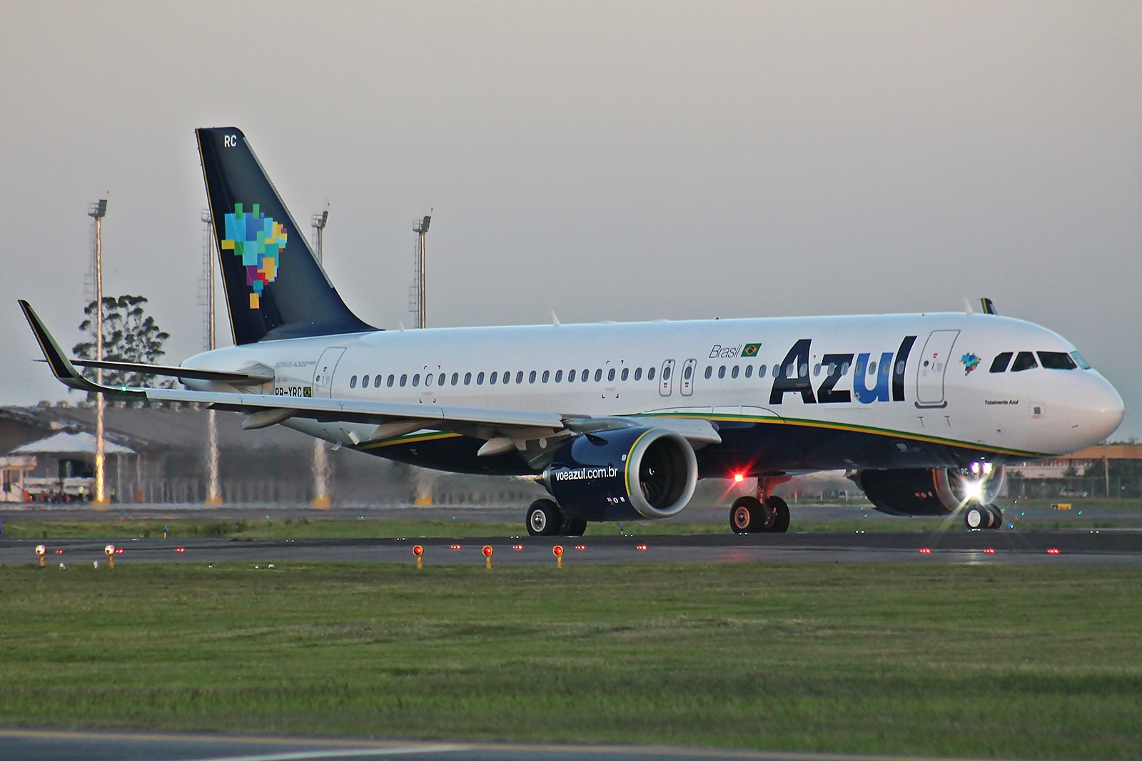 SBPA